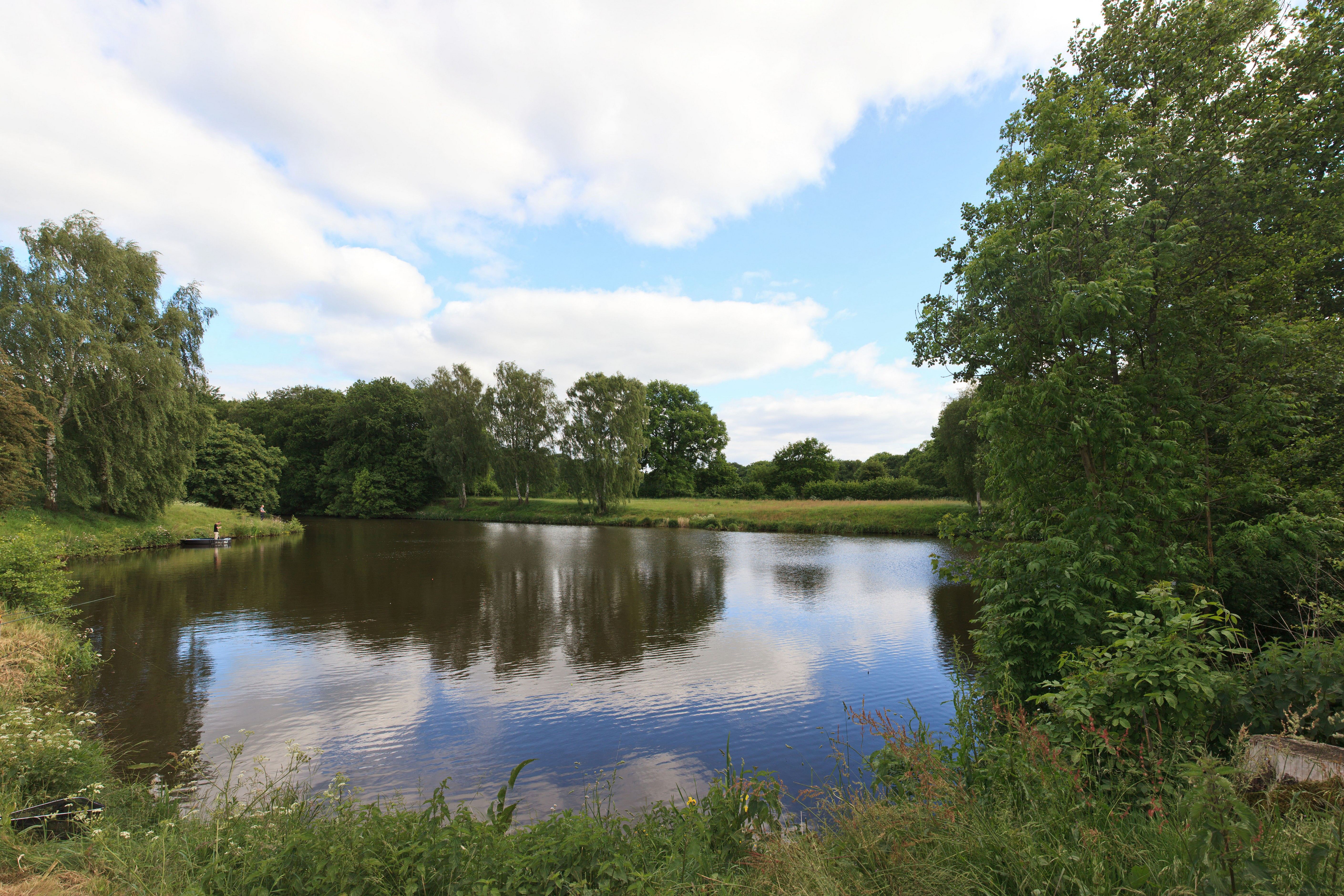 Die Obek, kurz vor der Mündung in den Trittauer Mühlbach